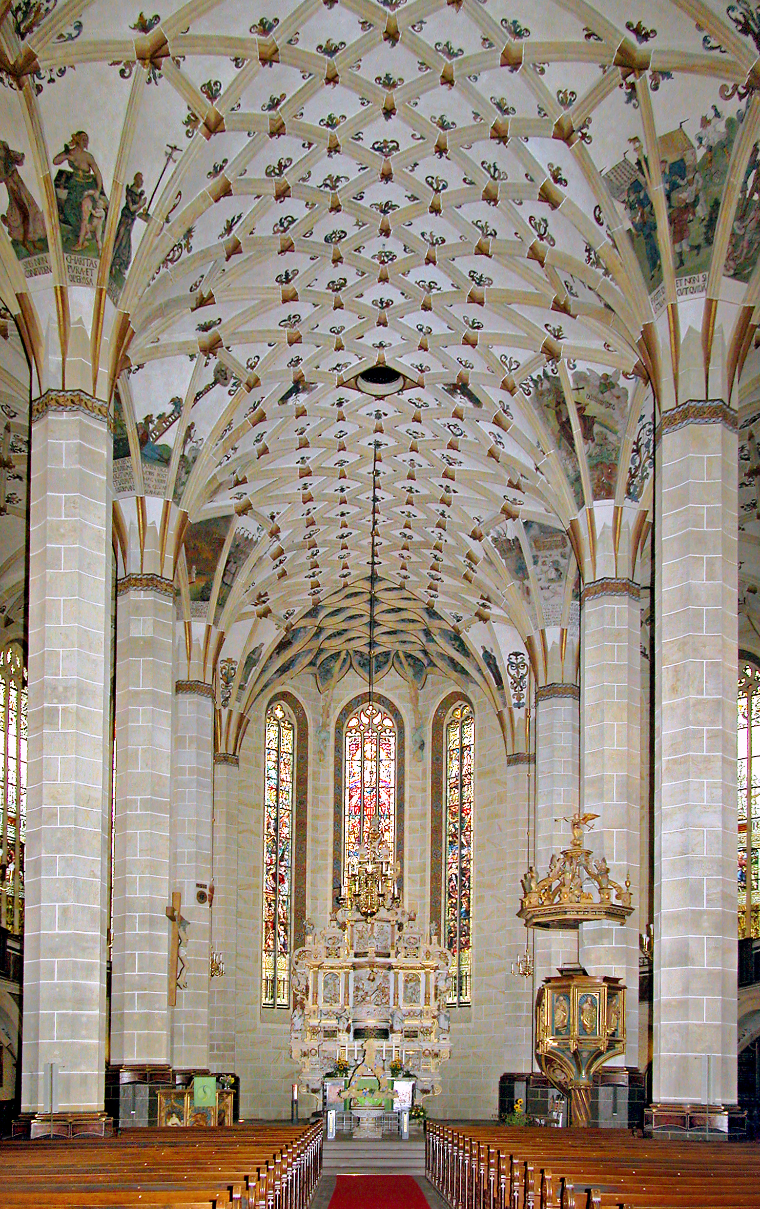 02.10.2008 01796 Pirna: Stadtkirche St. Marien, Kirchplatz (50.962419,13.943554). Erster Bau vmtl. 13. Jh. Heutiger Bau 1502-1546. Hauptmeister P. Ulrich. [DSCN34368&34370.TIF]20081002015MDR.JPG(c)Blobelt